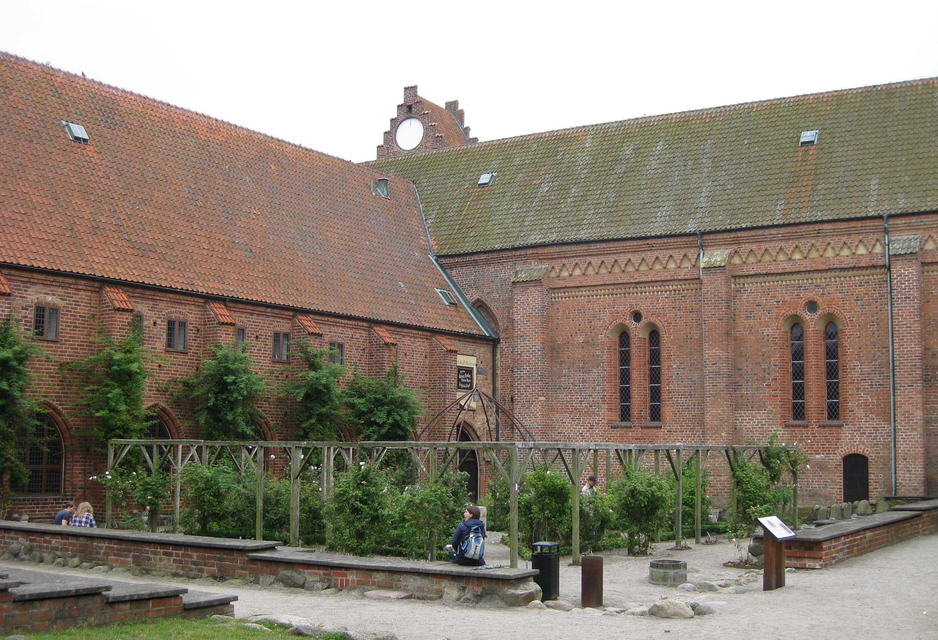 Ystads kloster, rosenträdgården